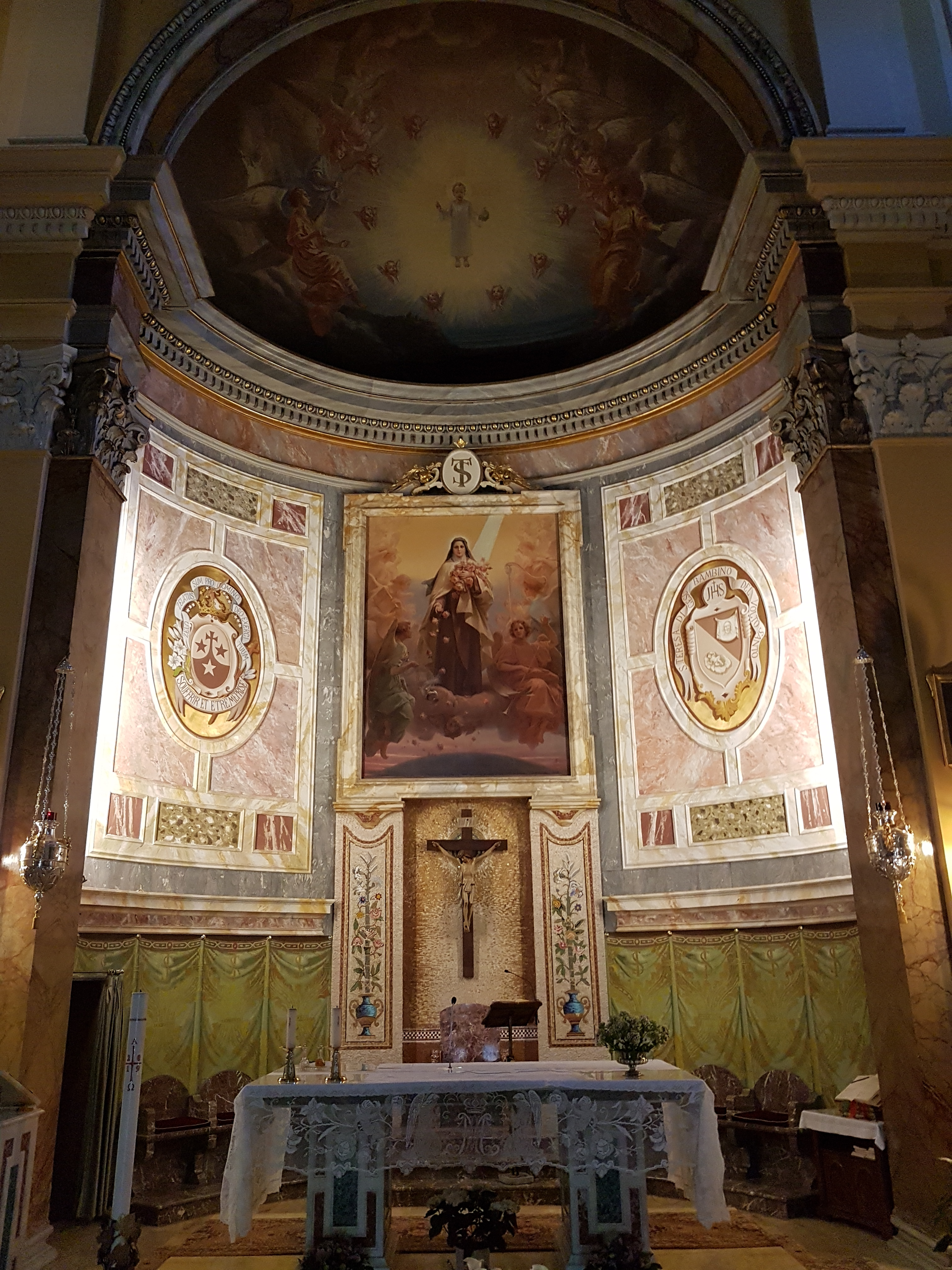 Santa Teresa in Panfilo (Rome), Chor mit Hochaltar